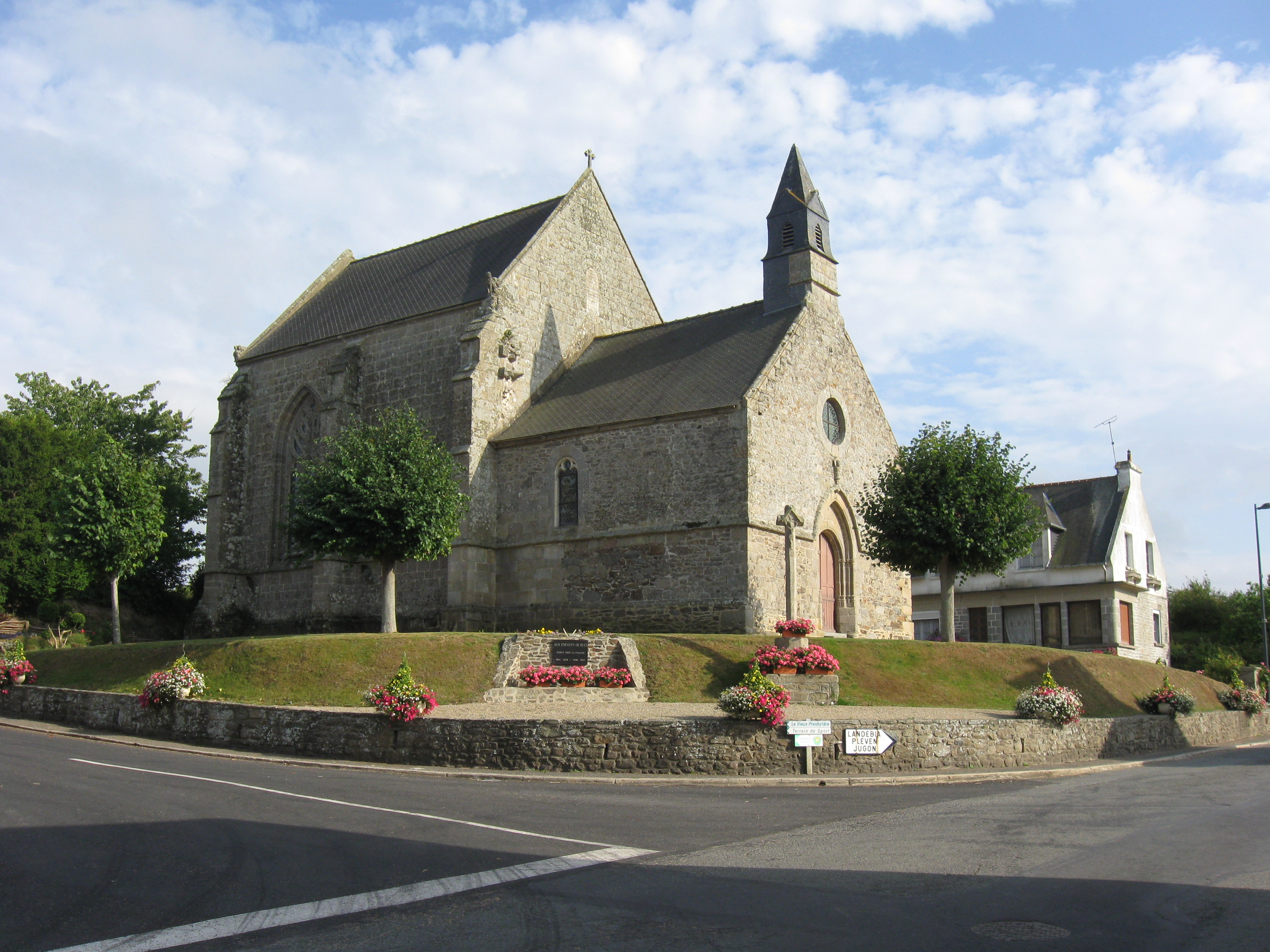 Chapelle Notre-Dame de Hirel. (Côtes-d'Armor, région Bretagne).